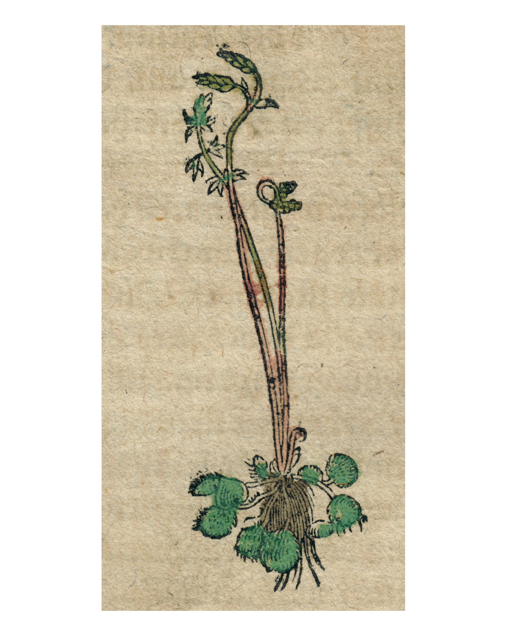 Abbildung von Drosera rotundifolia